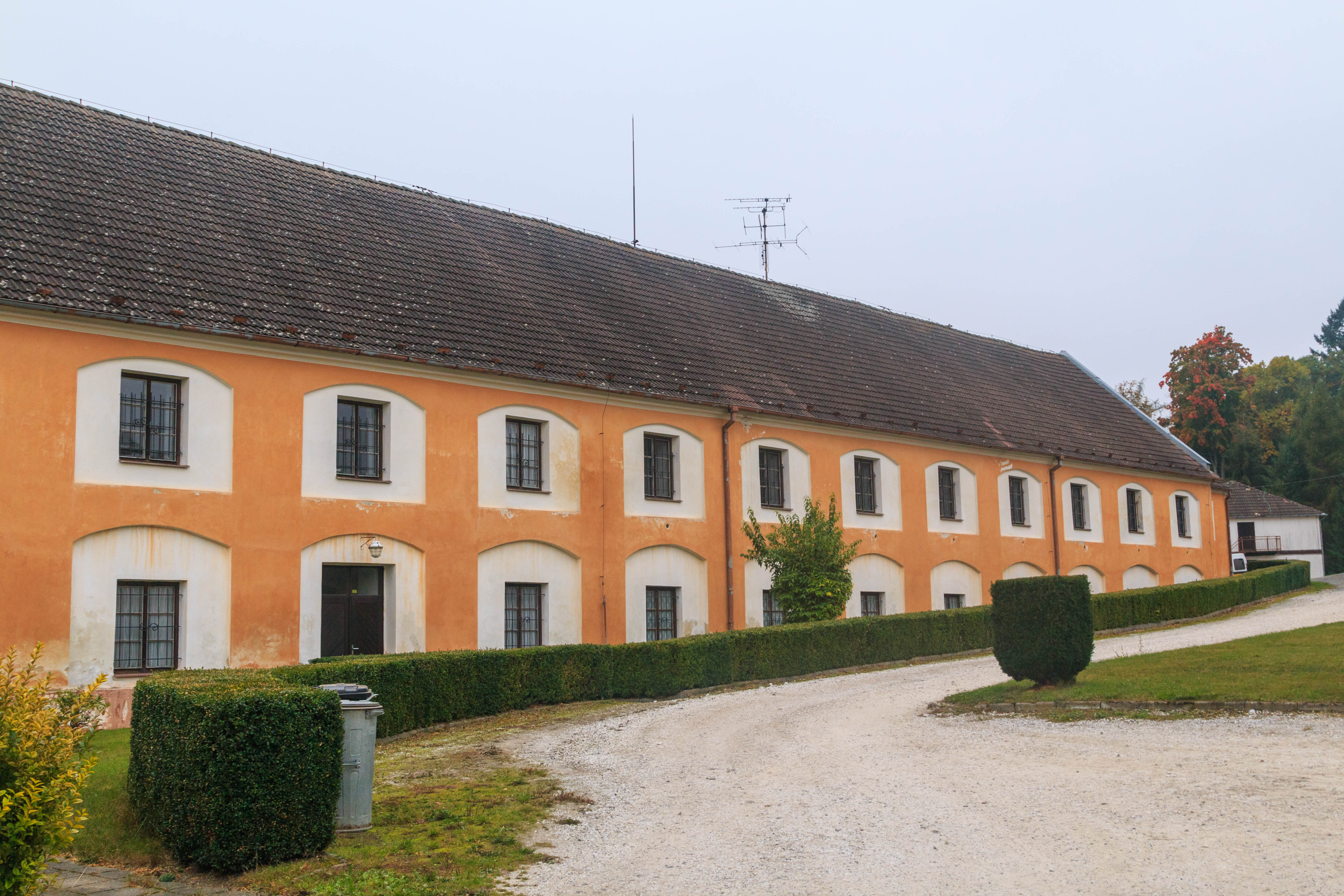 Čekanice - budovy u zámku